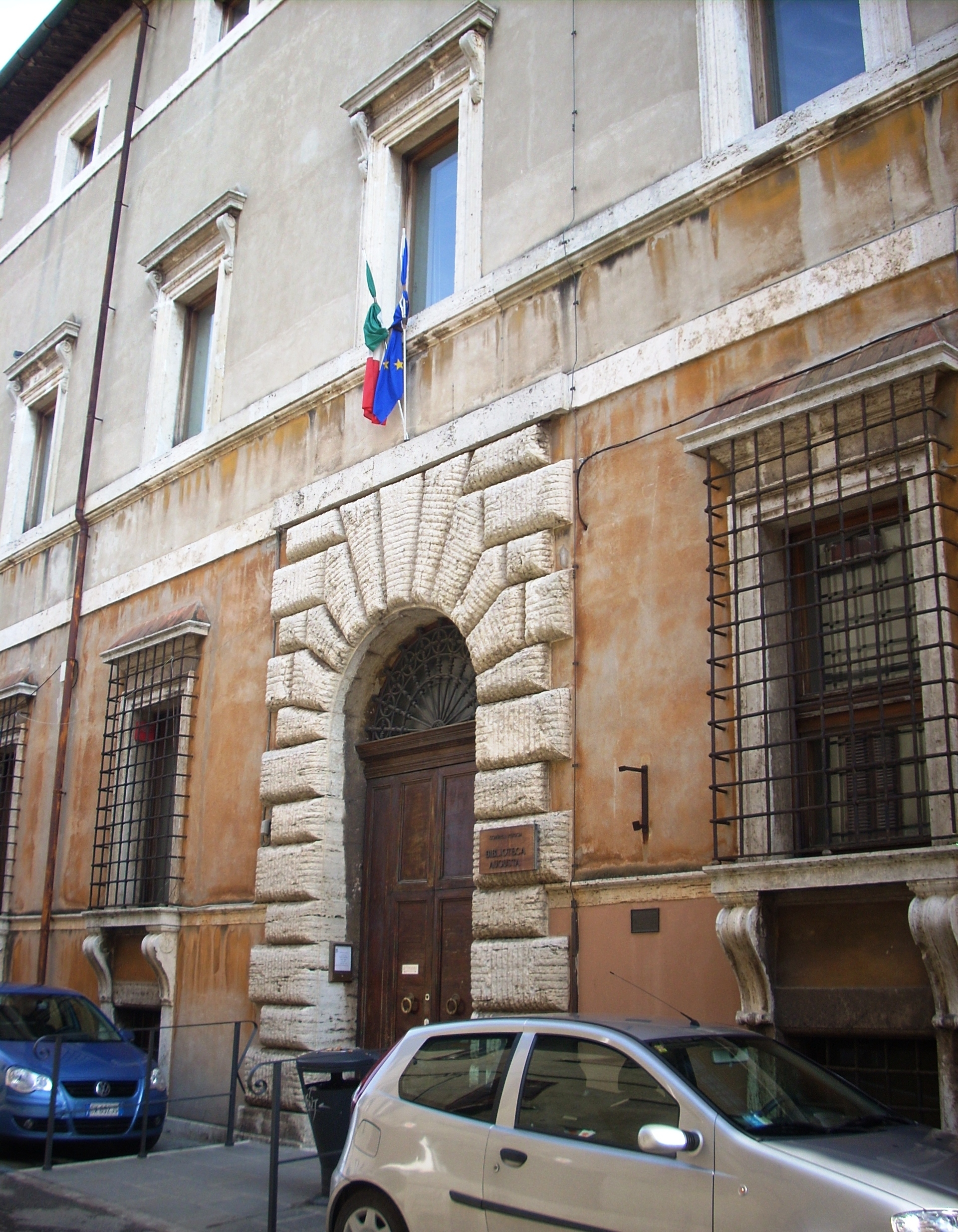 Ingresso della biblioteca